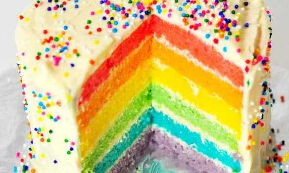 Rainbow cake atau kue pelangi